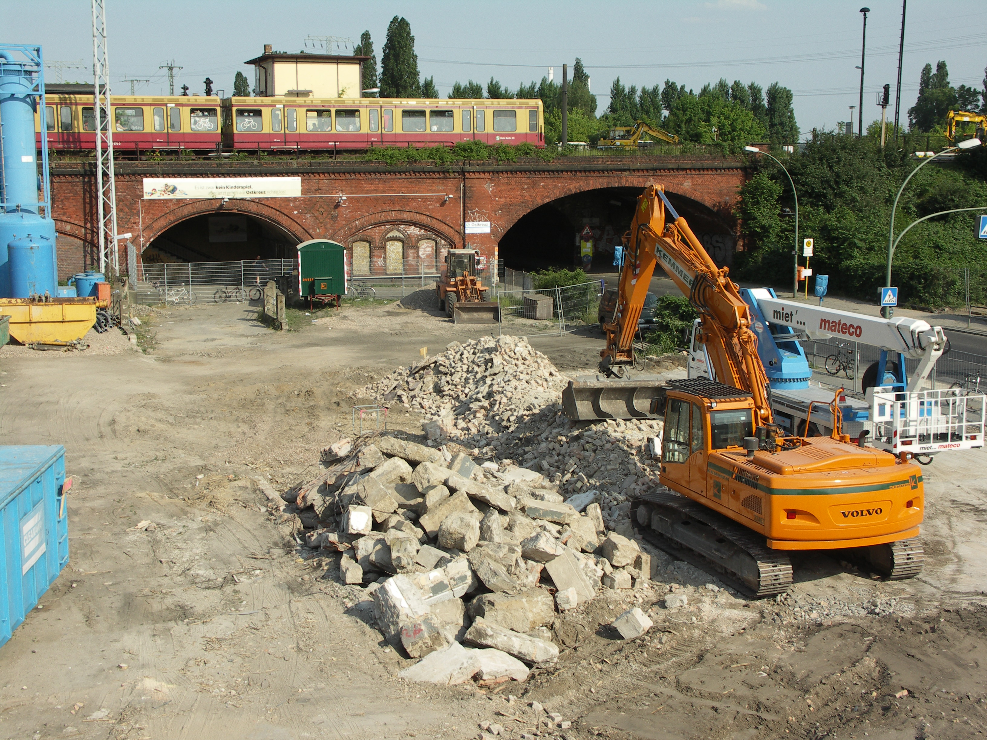 Reste des abgerissenen südlichen Zugangsgebäudes des Berliner S-Bahnhofs Ostkreuz an der Hauptstraße